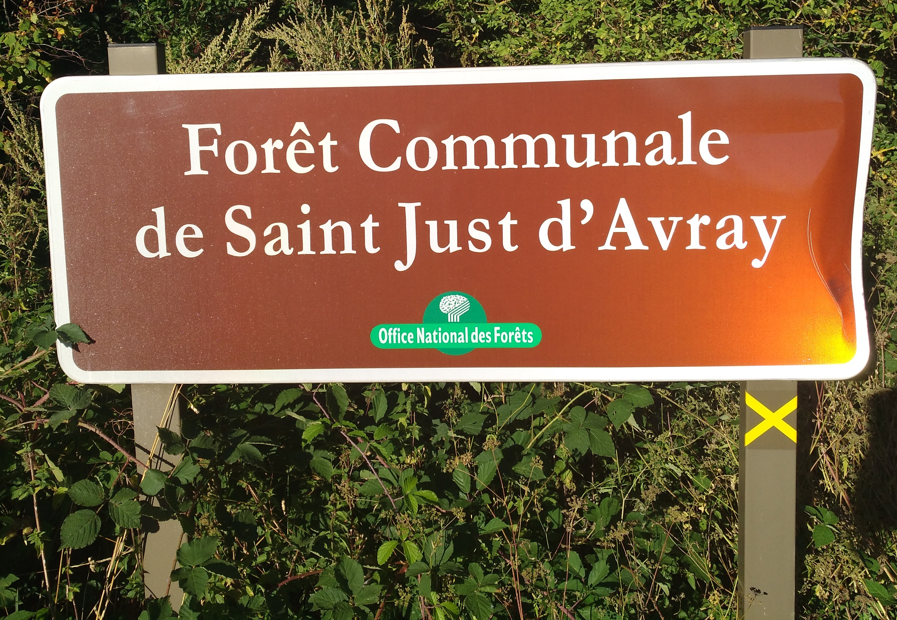 Panneau indiquant la forêt communale de Saint-Just-d'Avray (Rhône, France), par l'Office national des fprets.